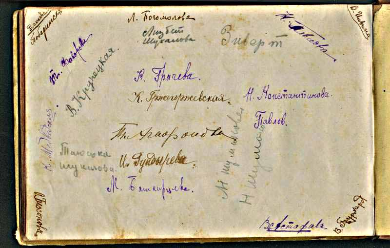 Автографы выпускниц института благородных девиц в Николо- Угрешском монастыре,1922 год